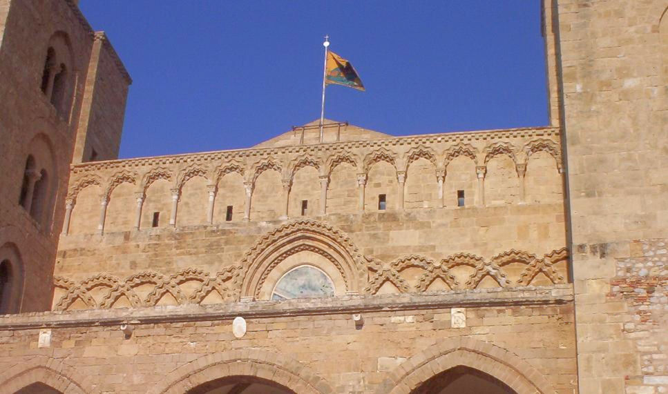 Foto dell'innalzamento della bandiera nel giorno della Festa del Santissimo Salvatore della Trasfigurazione a Cefalù